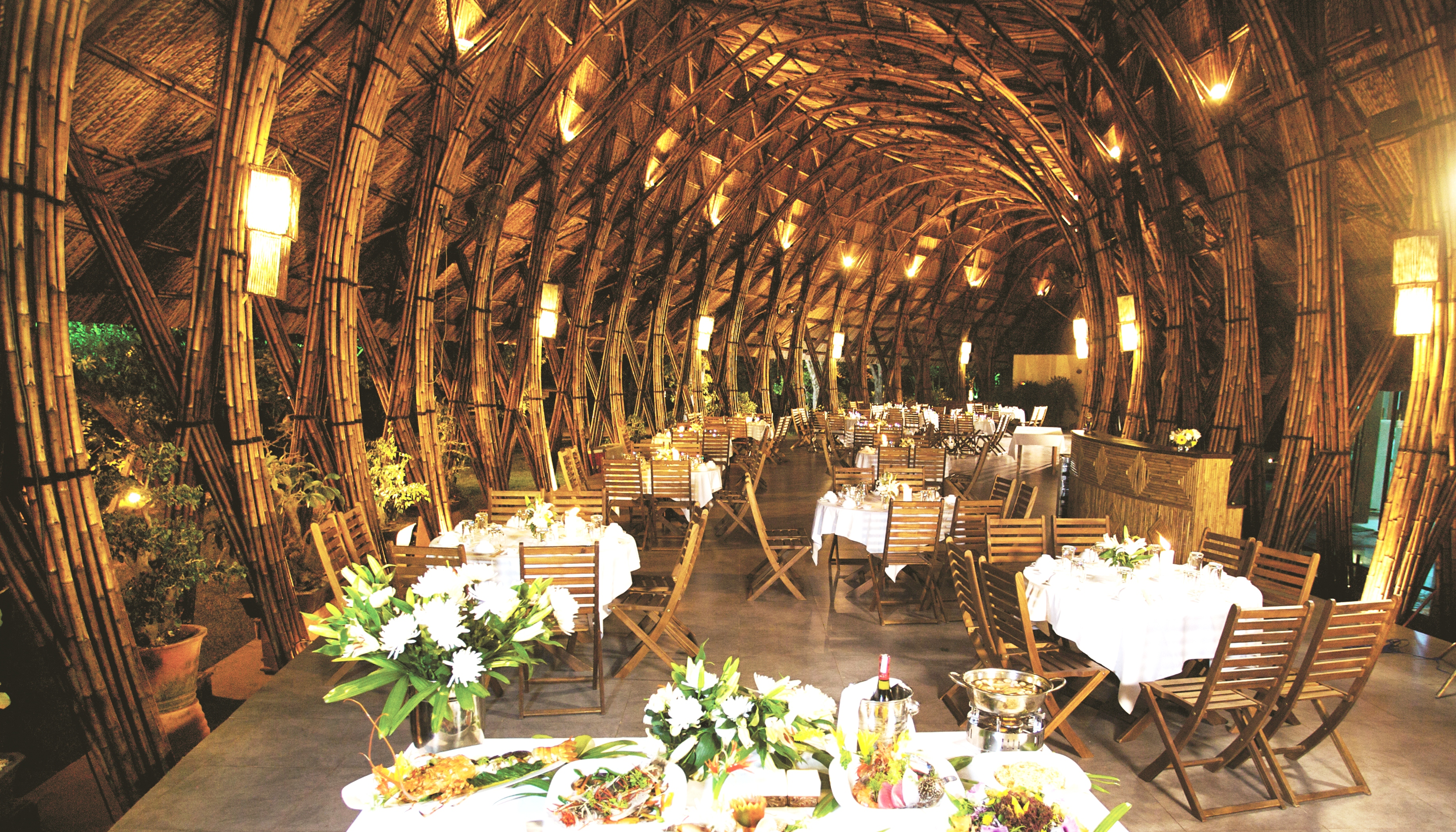 Nhà hàng Ocean View